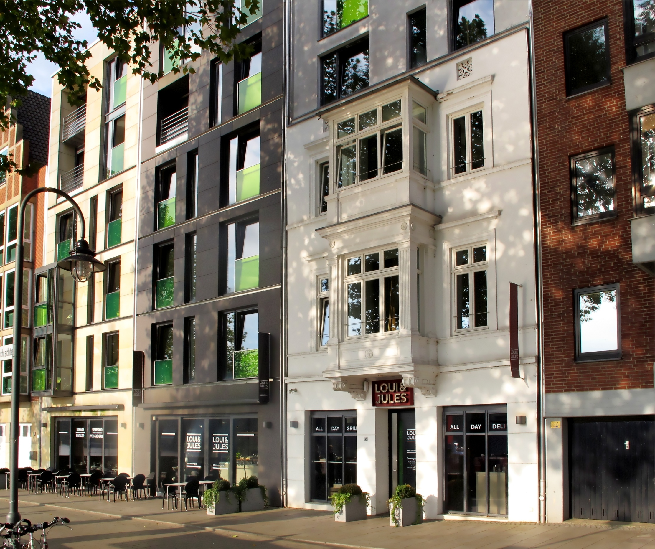 Haus Schlachte 36 (Langenstraße 72), Ansicht Schlachte; Bremen